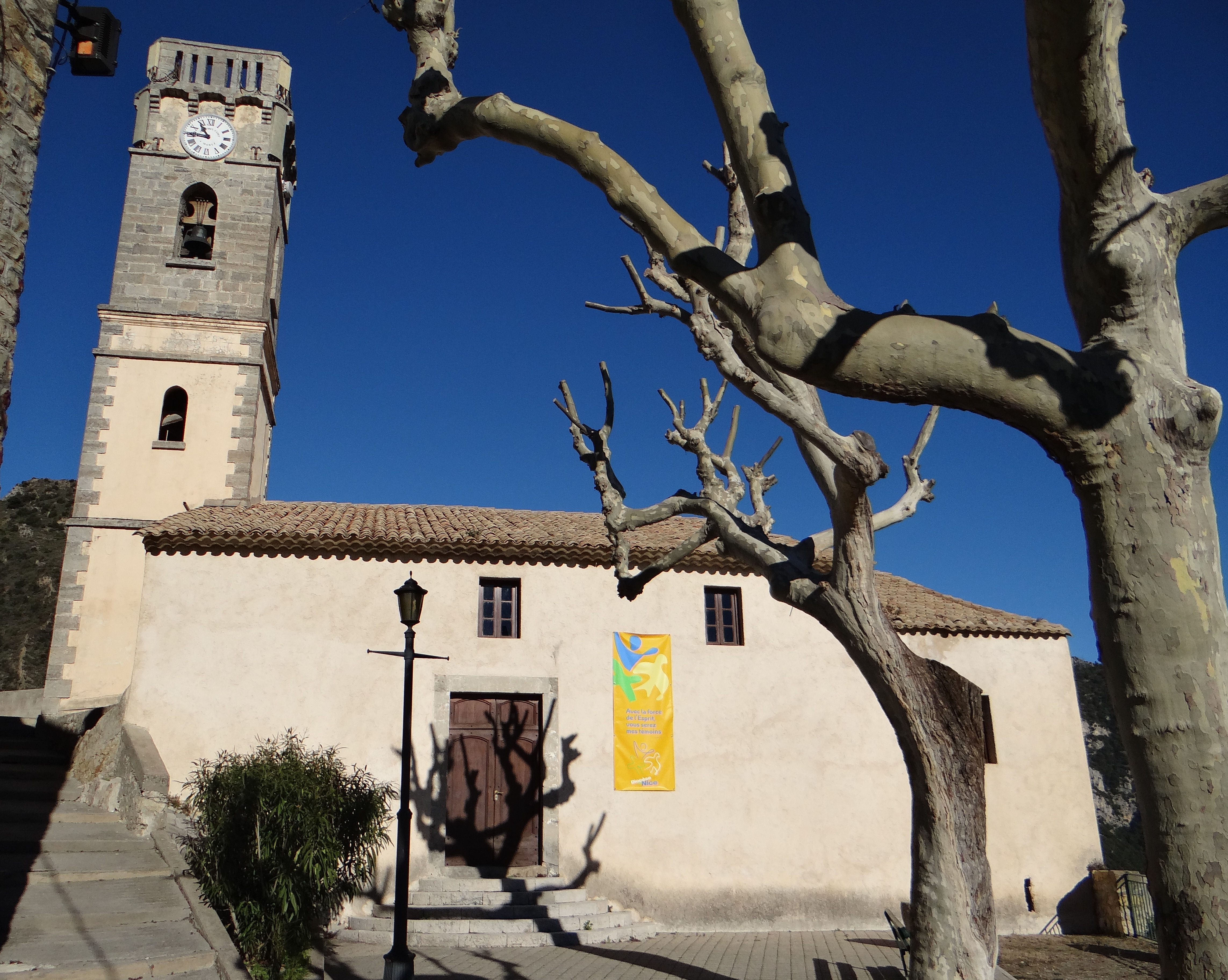 Bonson - Église Saint-Benoît - Vue d'ensemble